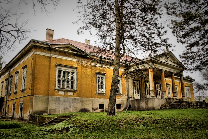 Putnok Serényi kastély homlokzat This is a photo of a monument in Hungary. Identifier: 3044